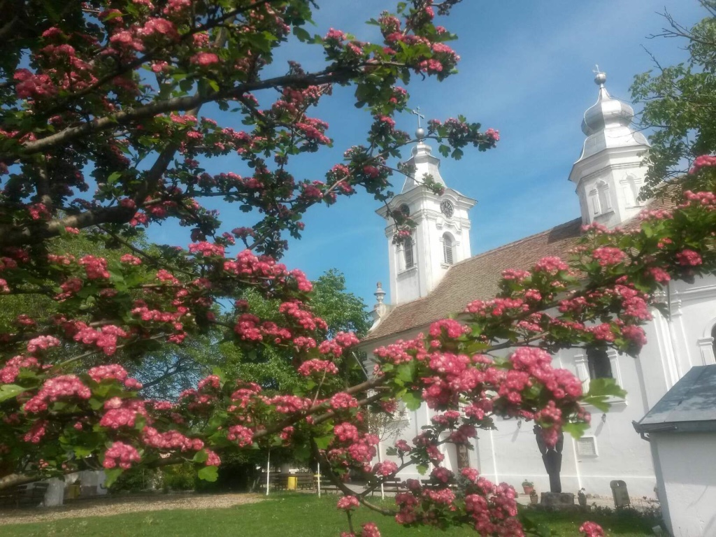 Biserica Mare 01